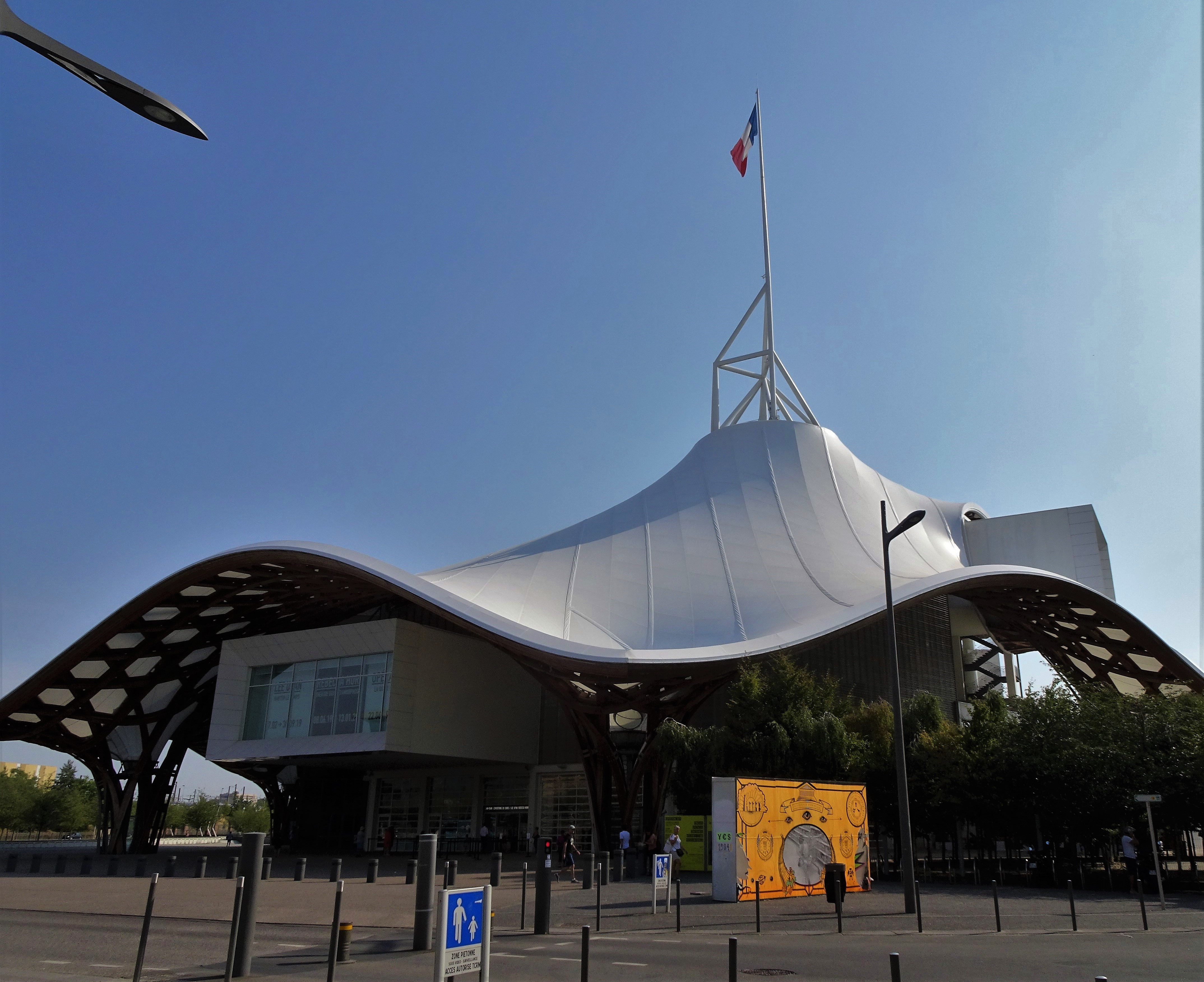 Photo prise lors de la canicule de 2019.